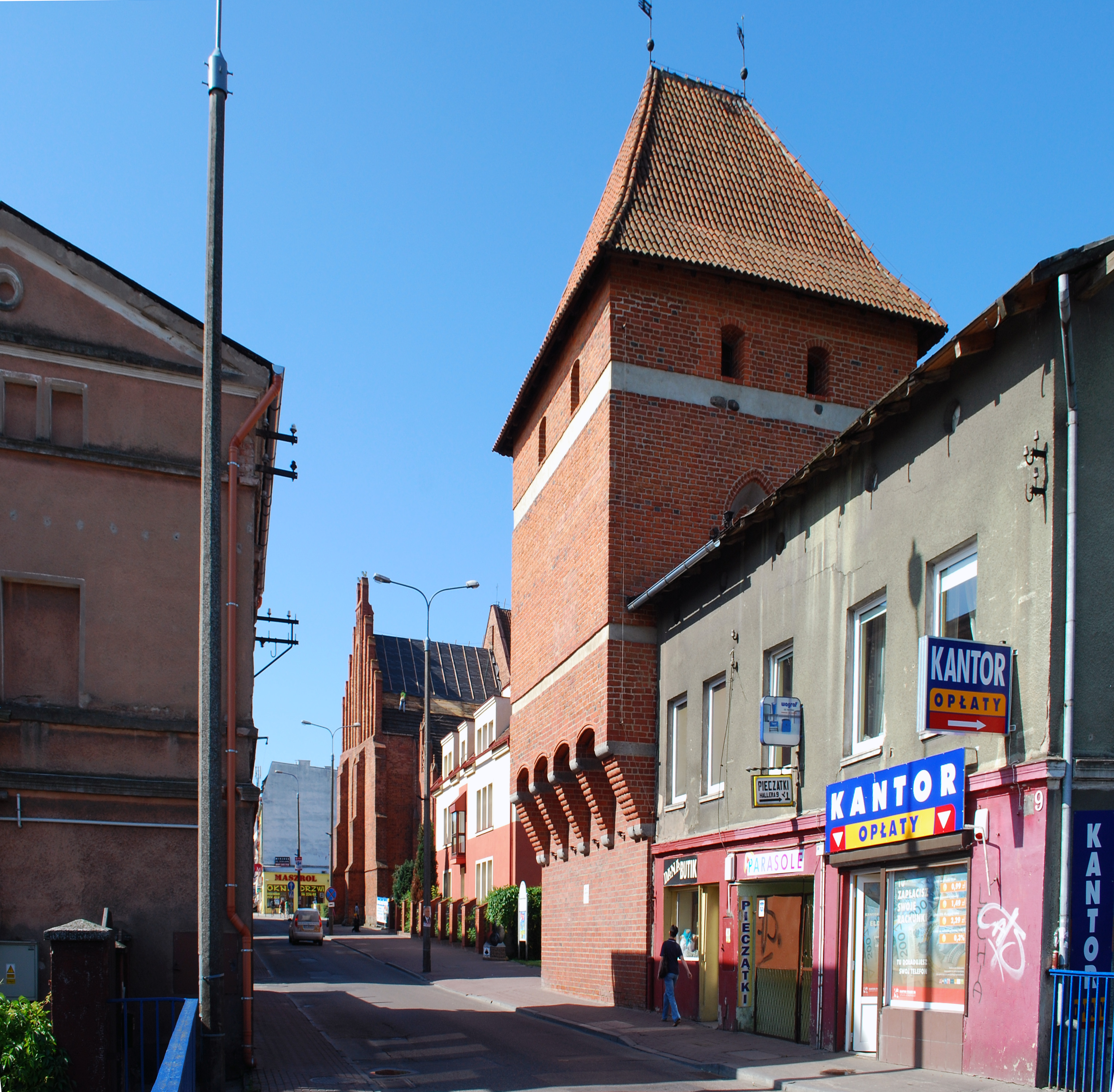 Starogard Gdański - Baszta Gdańska (Szewska) w zespole murów obronnych